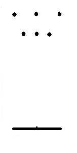 Ameskoako bola-jokoko diagrama sinplea